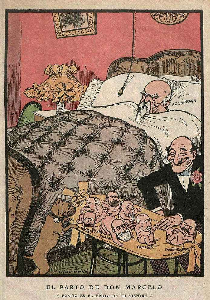 El parto de don Marcelo, en la revista satírica española Gedeón.